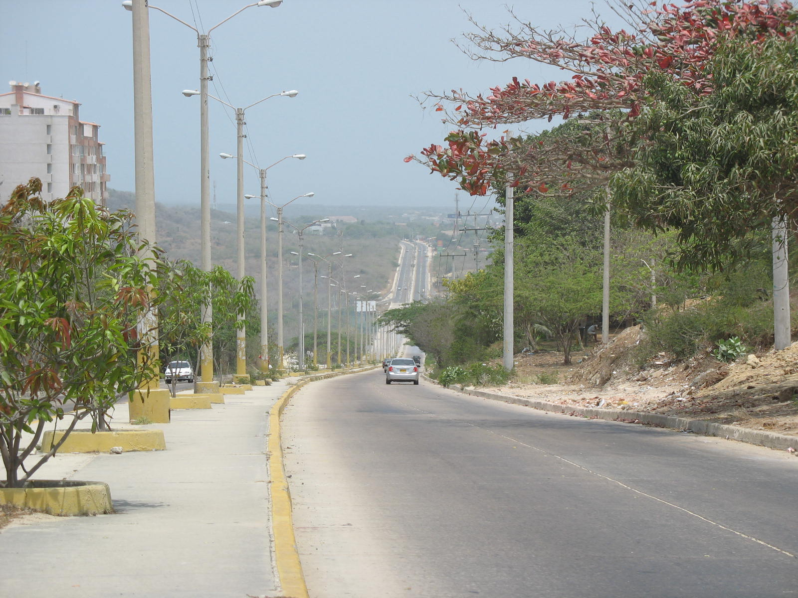 Barranquilla-Autopista al Mar